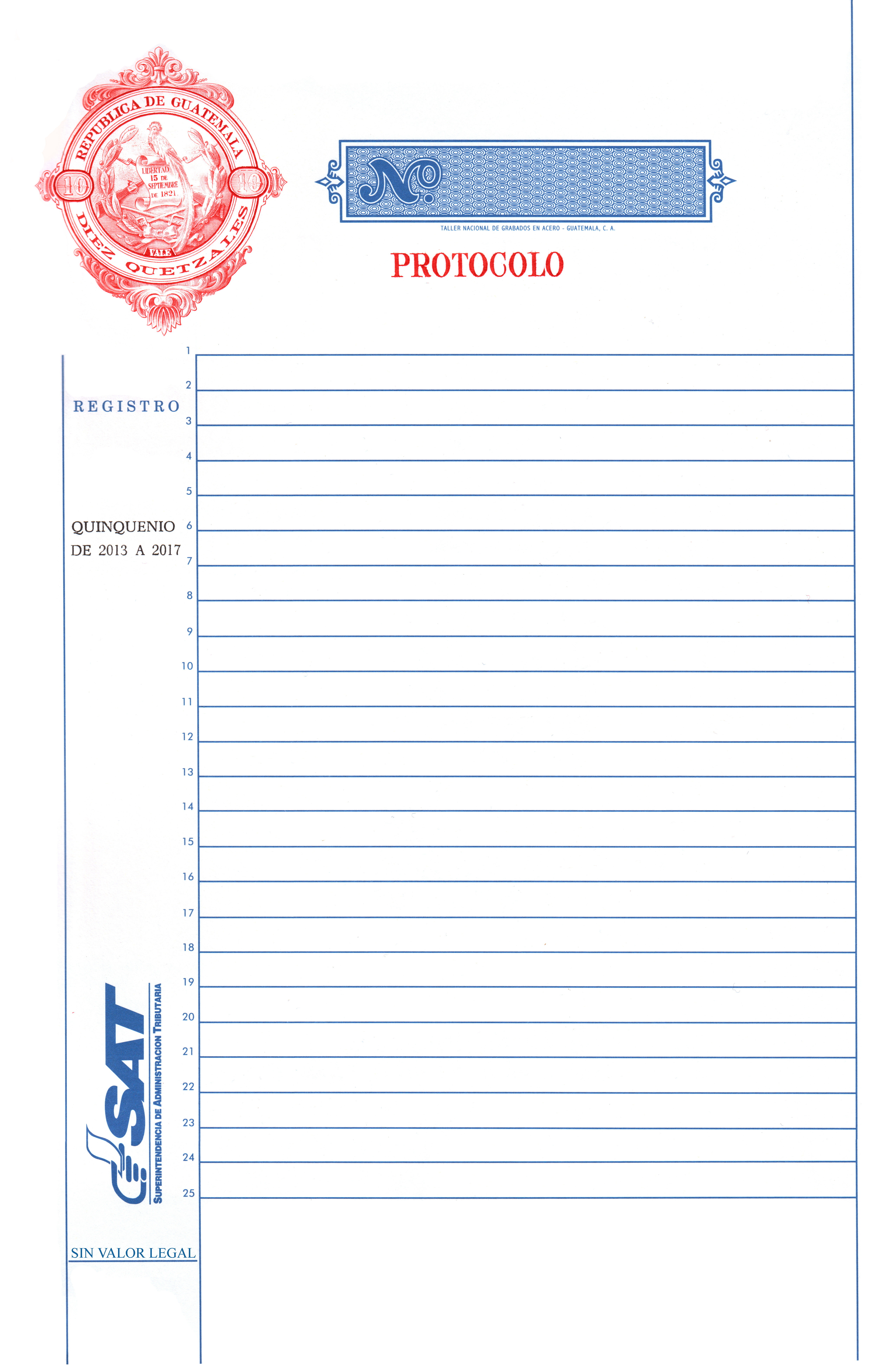 Parte delantera Hoja de protocolo para uso didáctico